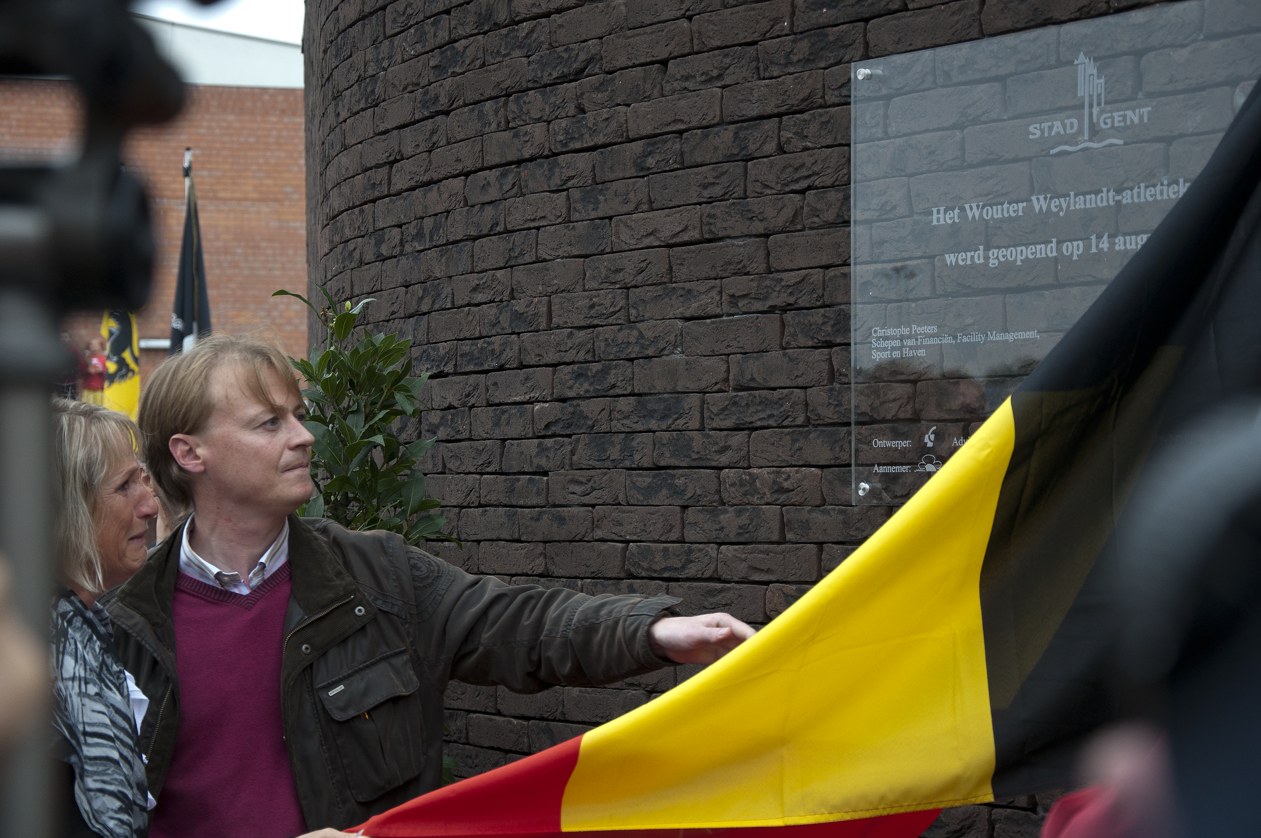 De opening van het Wouter Weylandtstadion, een nieuwe atletiekaccomodatie in Gentbrugge, België